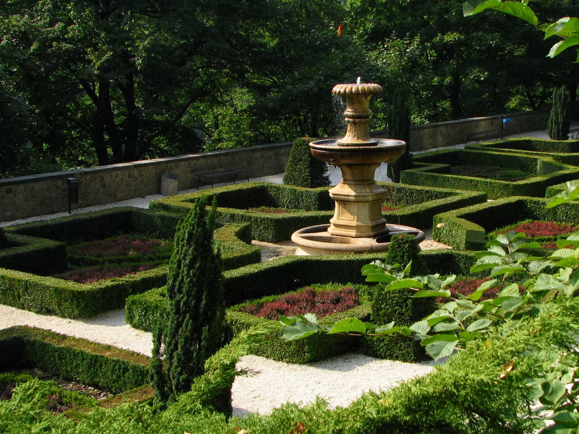 Książ - Ogrody Zamku Książ